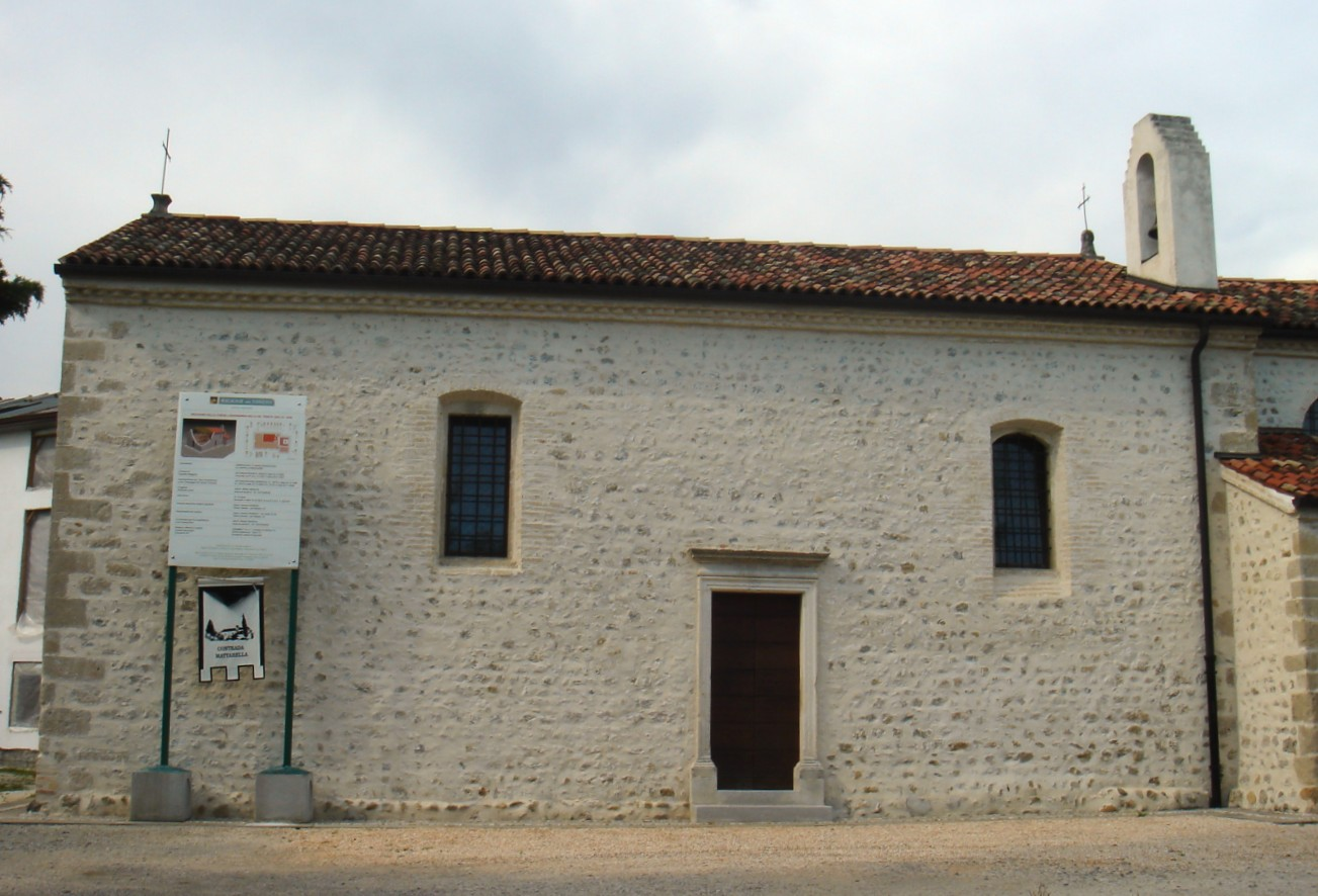 Cappella Maggiore, TV: chiesa longobarda, IX sec.